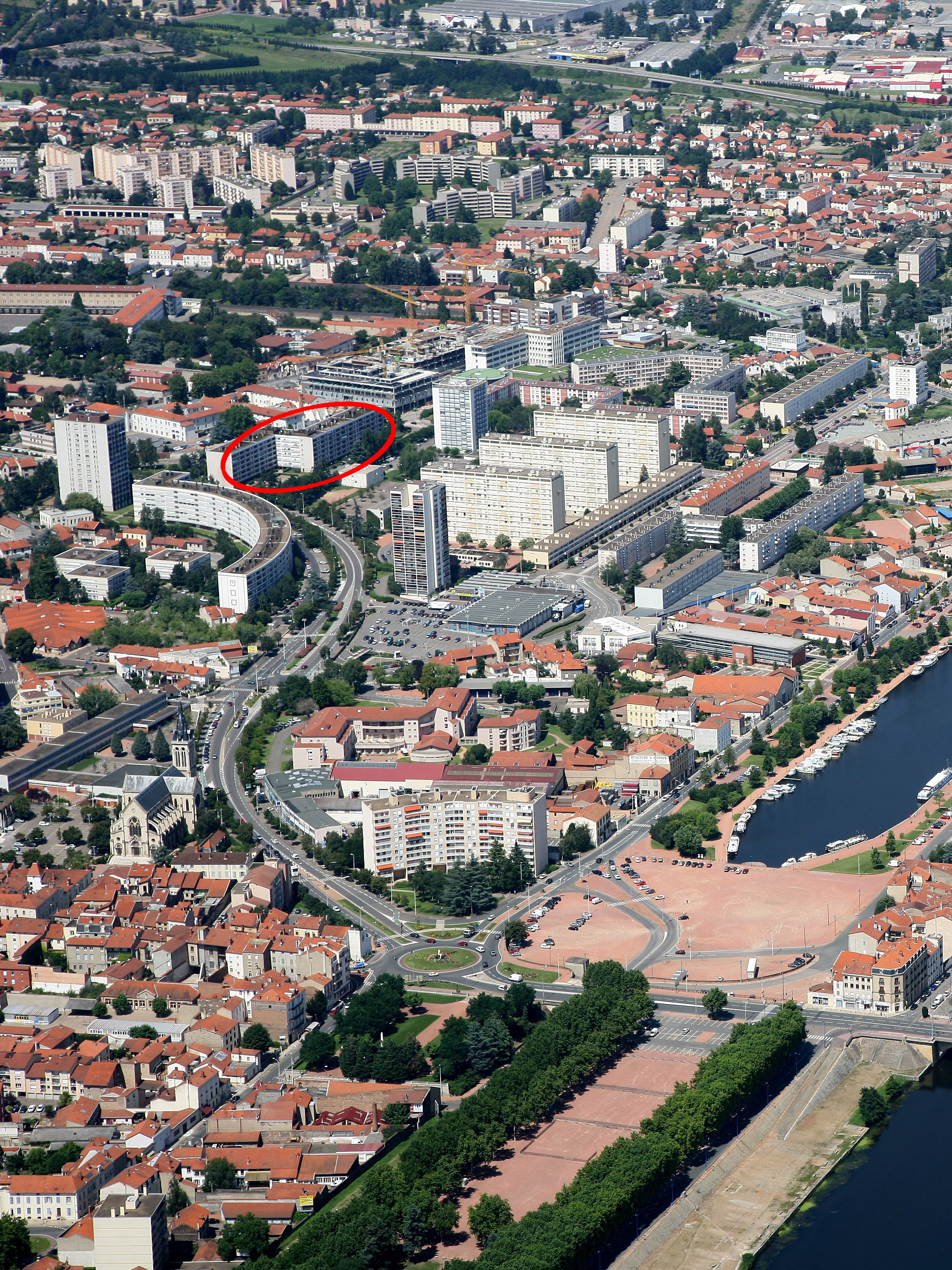 Luftbild von Roanne mit markiertem Wohnort von Rachid Kassim